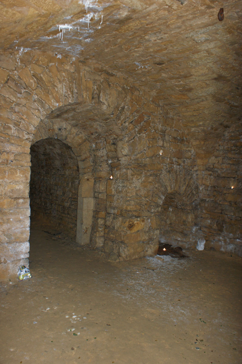 Fort Dumoulin (Festung Lëtzebuerg), ënnerierdesch Plëss Darem.